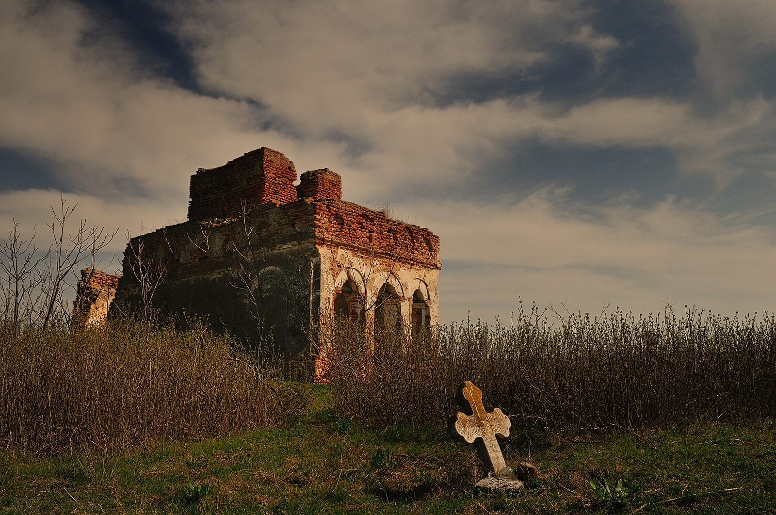 Biserica Pitigaia-poarta hramul Sfantului Nicolae,si a fost zidita pe la 1733.Satenii din Pitigaia spun ca biserica s-a daramat la cutremurul din 1977 si de atunci nu s-au mai oficiat slujbe; totusi, in incinta este cimitir, iar cea mai recenta ingropare a fost in 2014.